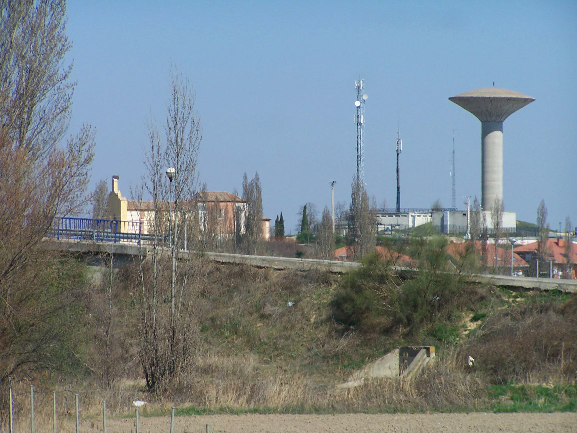 Ermita y depósito de Laguna de Duero, Valladolid, Castilla y León, España.